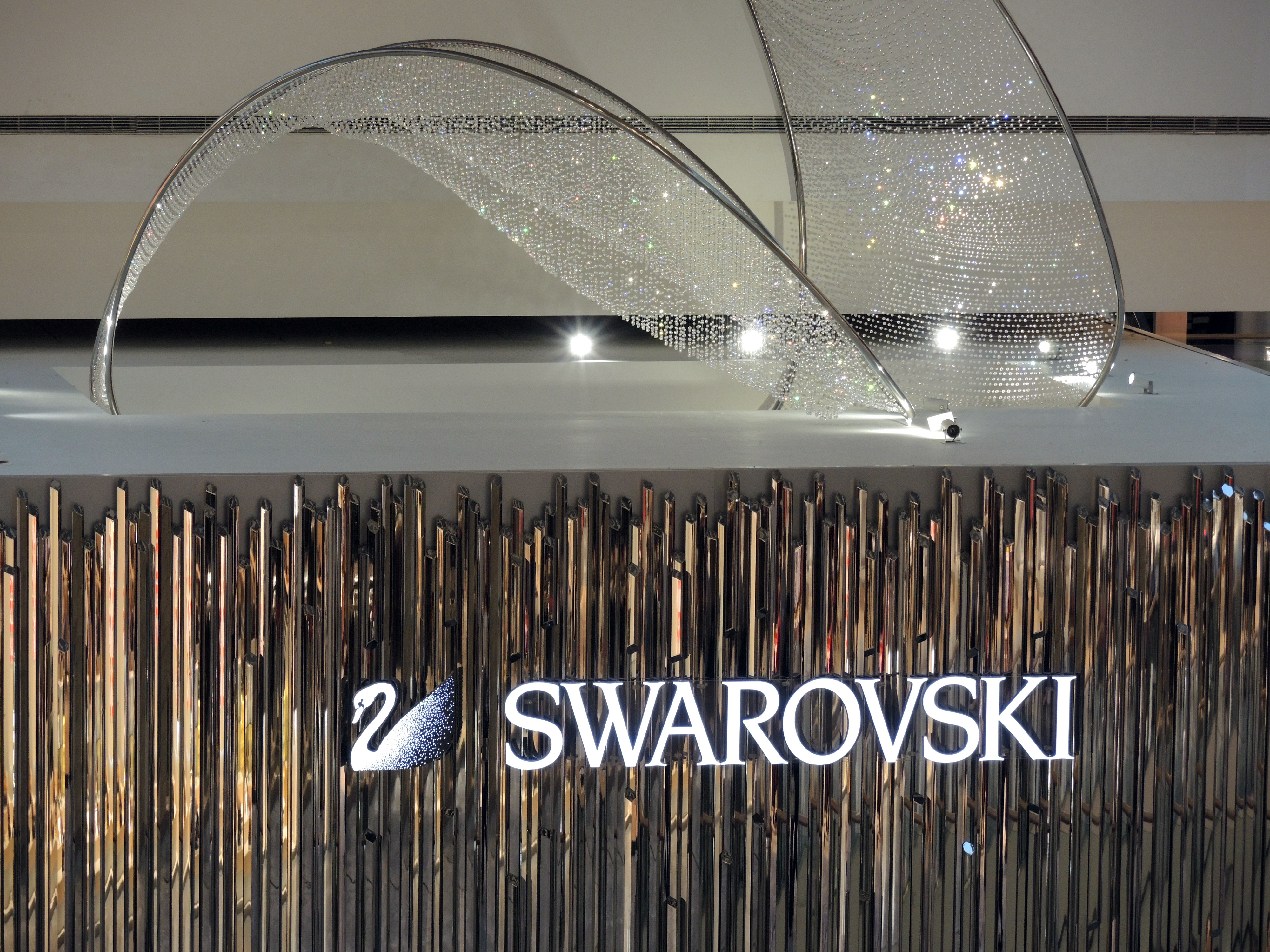 Glattzentrum in Wallisellen (Switzerland)